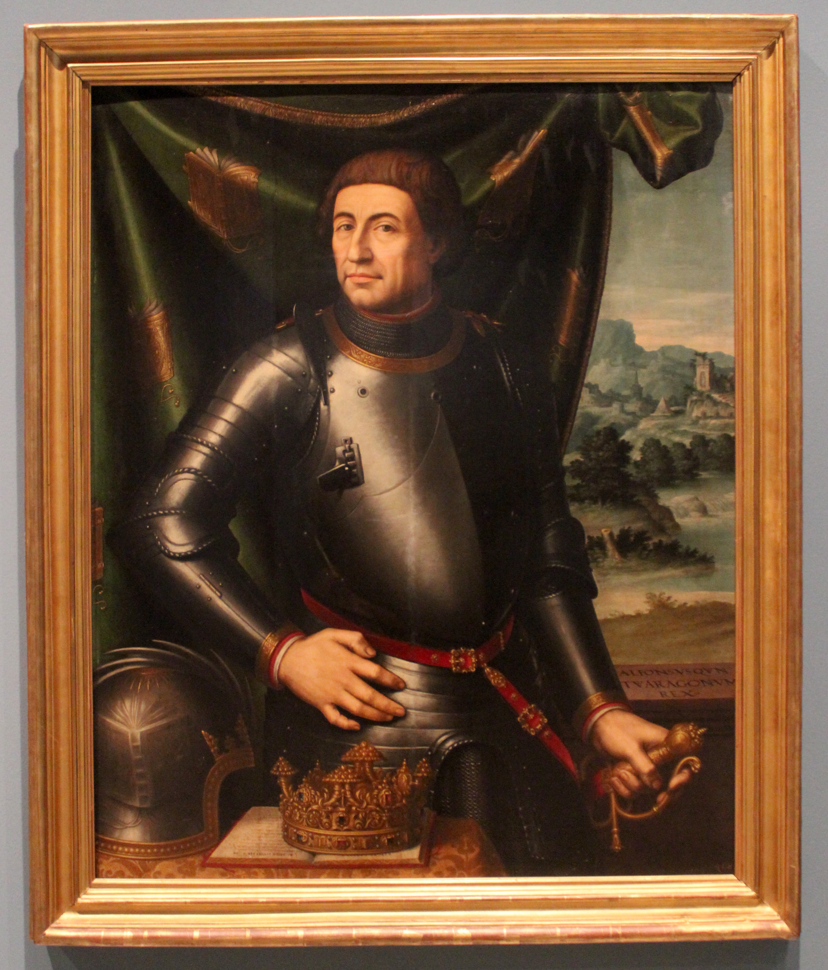 Juan de Juanes se basó en un retrato de Pisanello. Alfonso V de Aragón (1416-1458) viste armadura de época de Carlos I de España. La cabeza sin cubrir expresa su condición pacífica. En primer término, encima de la mesa, se presentan objetos significativos: corona (rey), yelmo (conquistador) y libro abierto (cultura). Este último denota su amor por la cultura y figura asimismo en la corona, la cortina del fondo, el pomo de la espada y el lateral del casco. La corona está ornamentada con piedras preciosas en su aro y cuernos de la abundancia, símbolo de la prosperidad. El libro muestra título y autor: "DE BELLO CIVILI LIB. I" y "C. IVLI. CAESARIS" (La guera civil de Julio César), y une la condición militar con la sabiduría, las armas y las letras. A través del ventanal se observa un paisaje con ruinas romanas, y se ha postulado que aparece el Castel Nuovo de Nápoles, residencia del rey de Aragón tras su conquista de Nápoles.